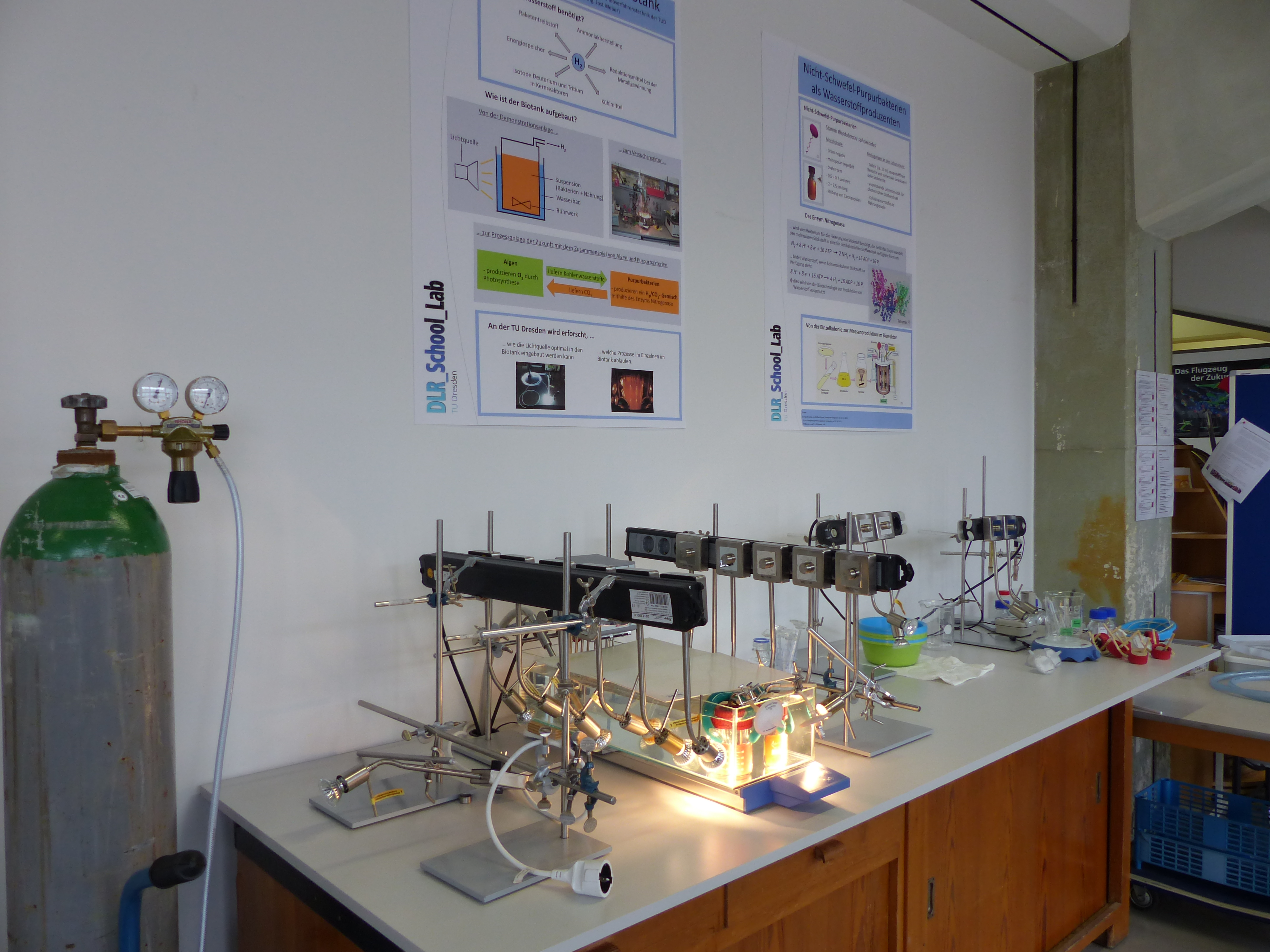 DLR School Lab Dresden, in den Technischen Sammlungen Dresden